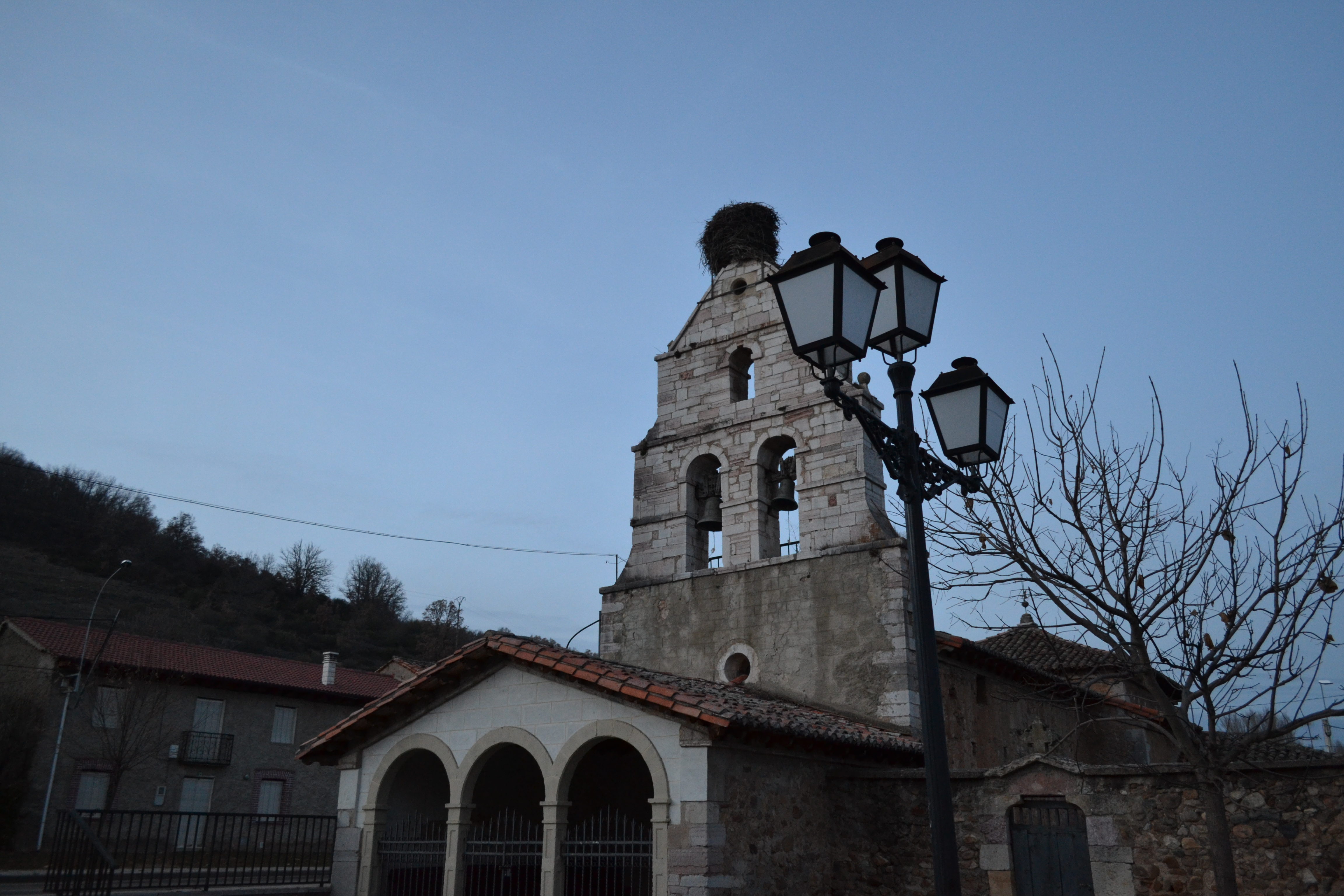 iglesia románica de Santo Tirso, Matueca de Torío